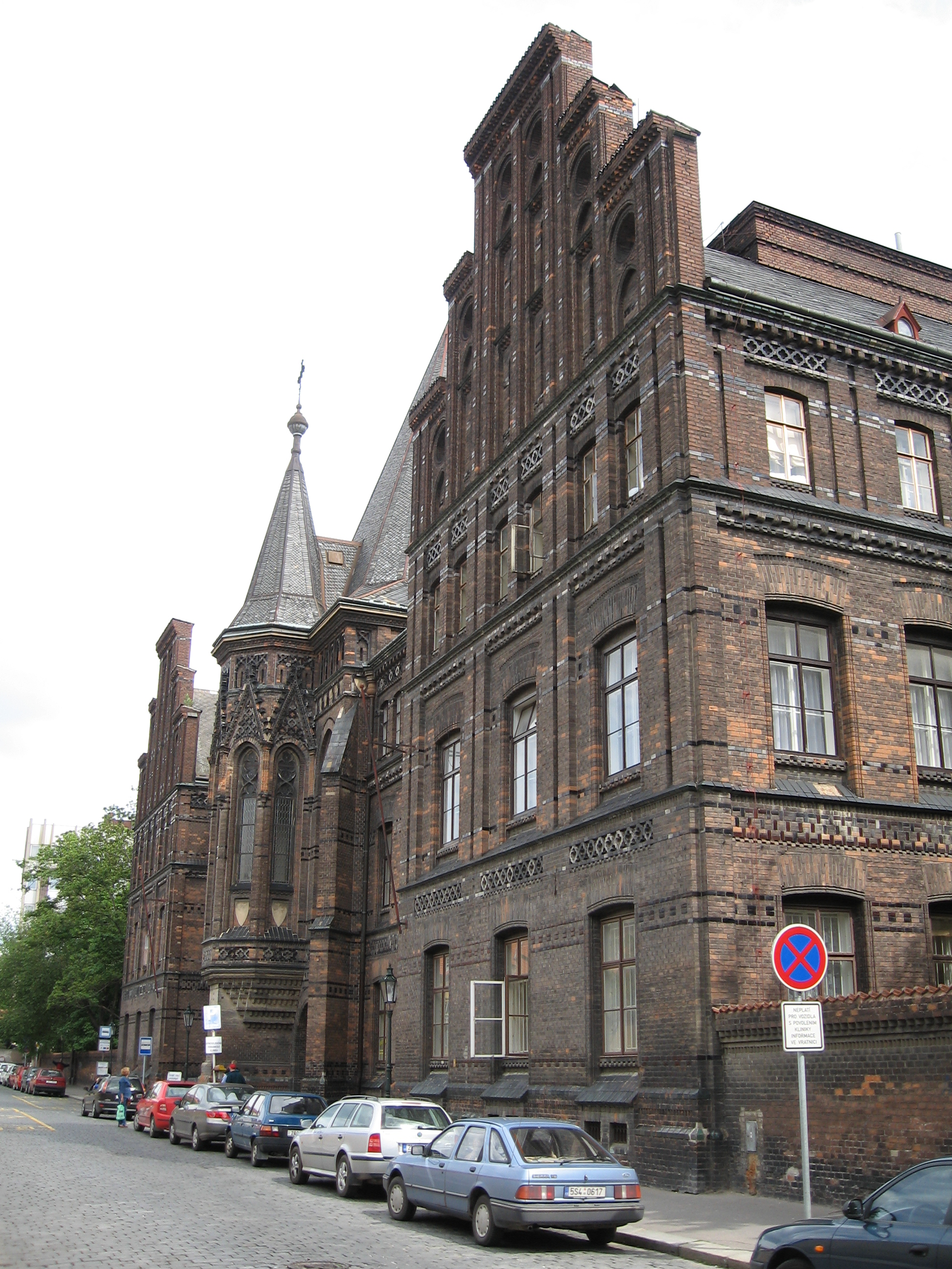 Hospital U Apolinare, Praha